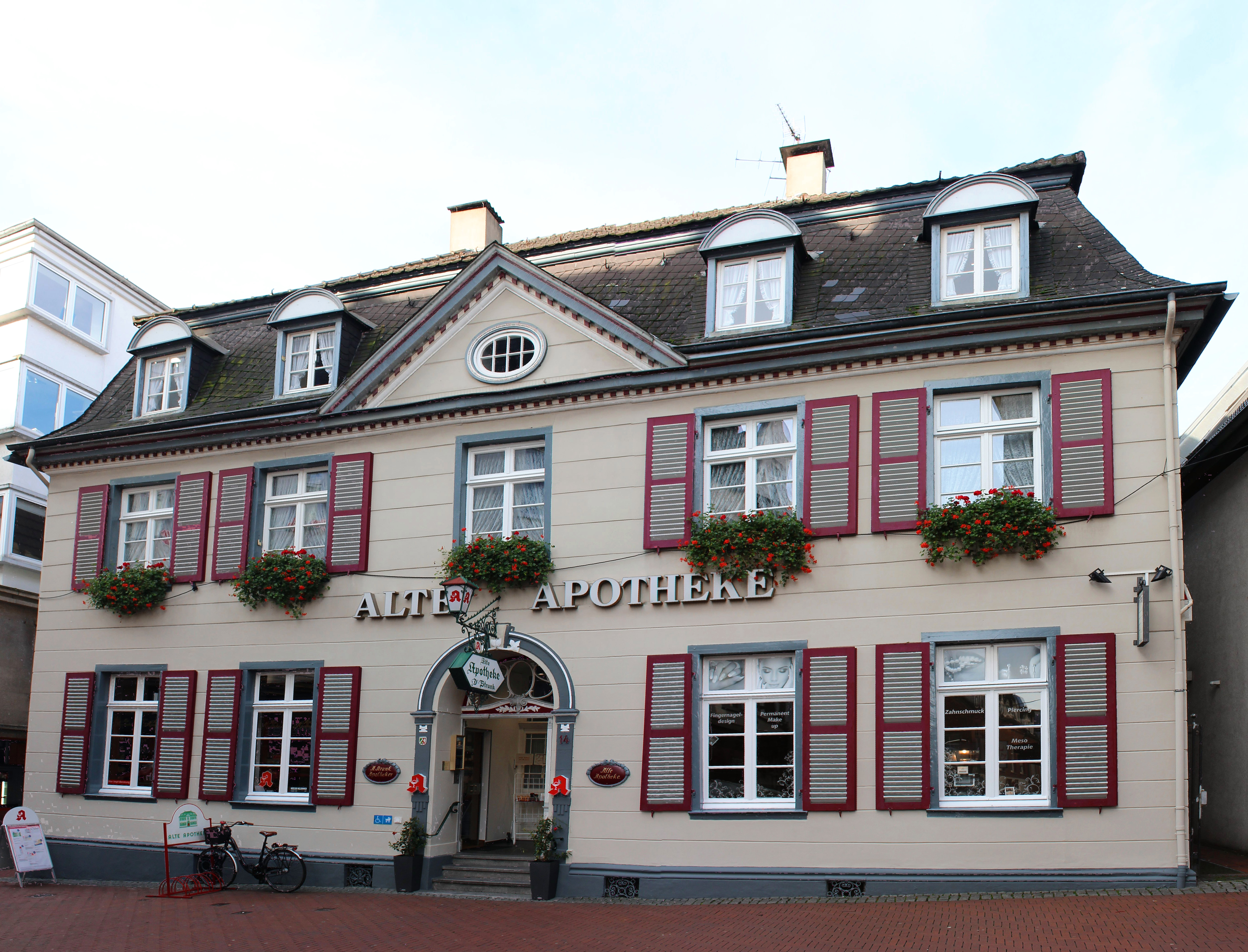 Alte Apotheke, Breite Straße Recklinghausen